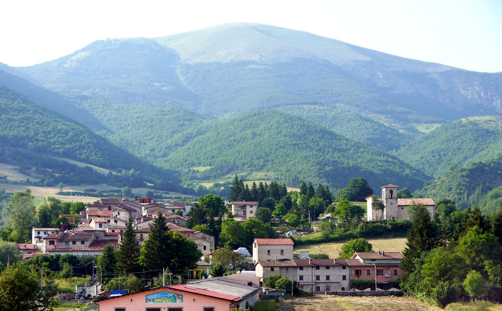 bacugno panorama